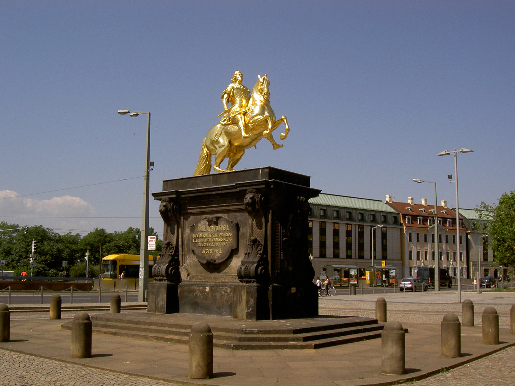 Dresden 2008 | der "Goldene Reiter"